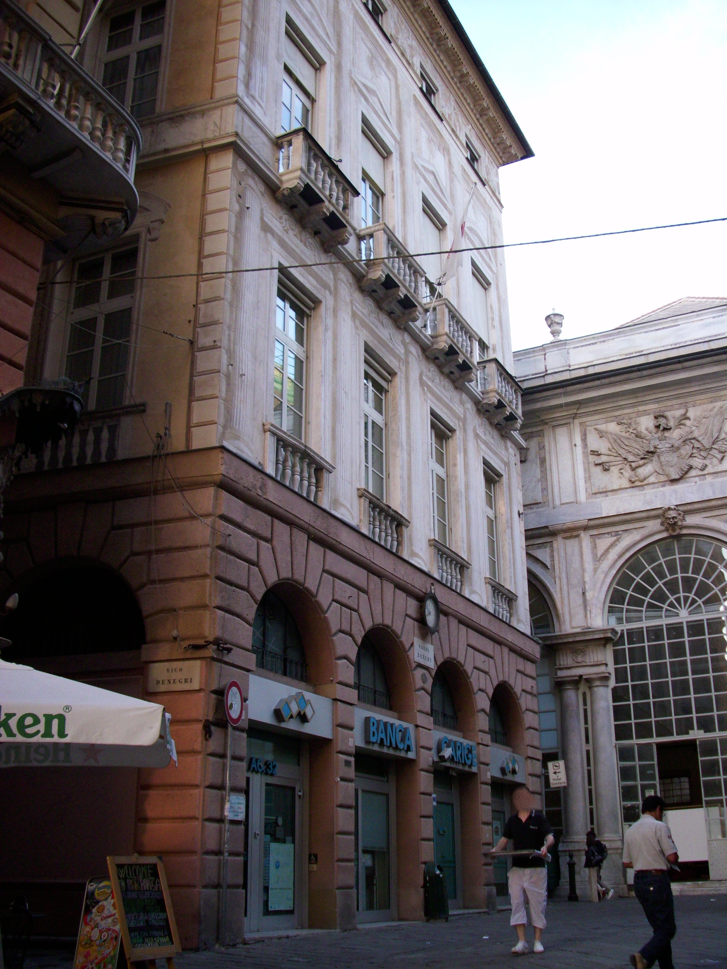 Palazzo Ambrogio Di Negro fotografato da via ponte Reale, Genova. E' uno dei palazzi dei Rolli patrimonio dell'umanità dell'UNESCO